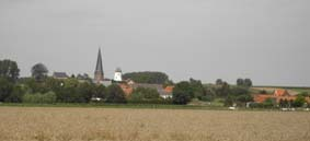 Algemeen zicht op Baaigem.